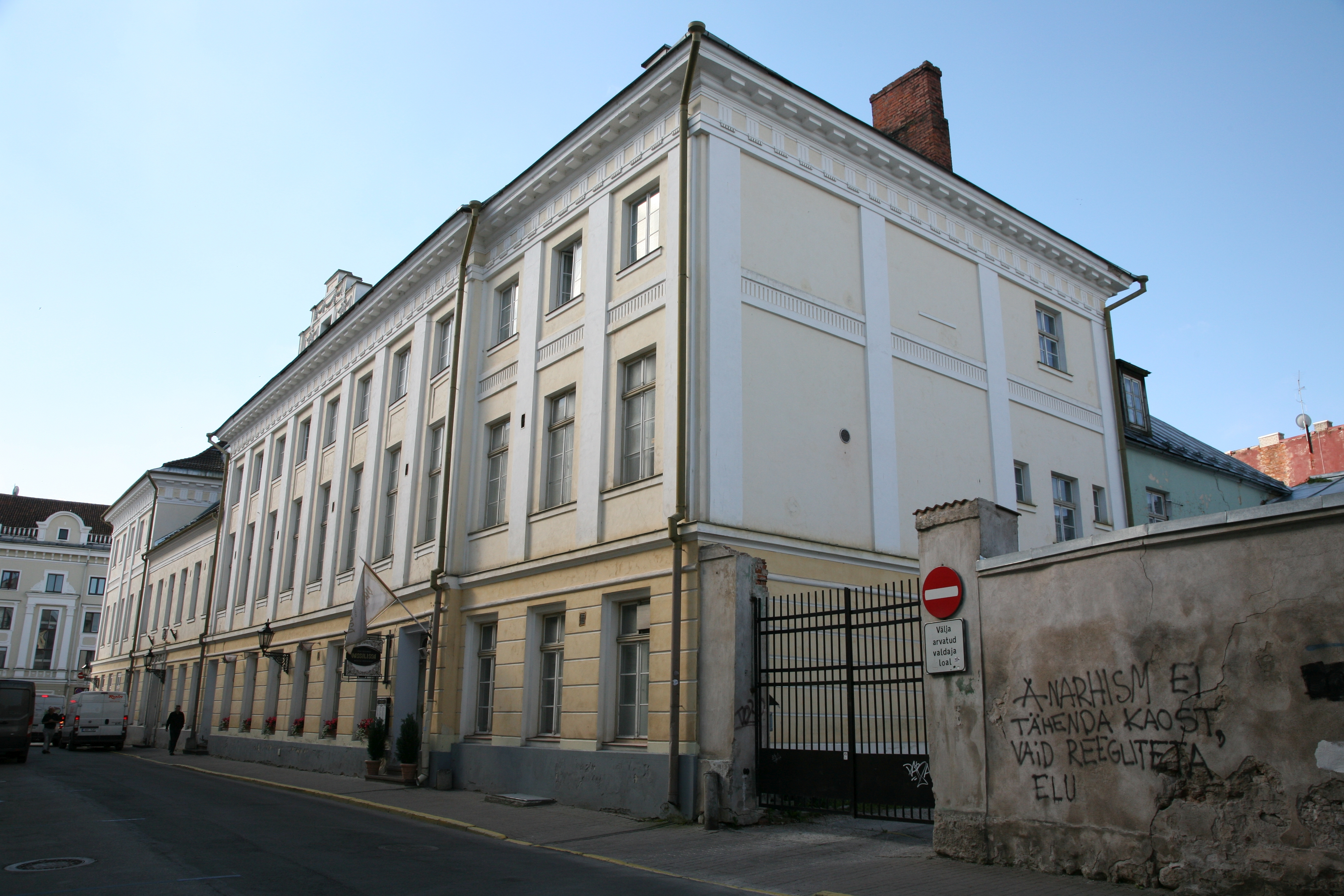 Tartu Kultuurihoone, vaade Kompanii tänavalt. 4. august 2015